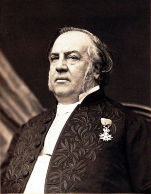 Portrait de Louis Clapisson par Pierre Petit